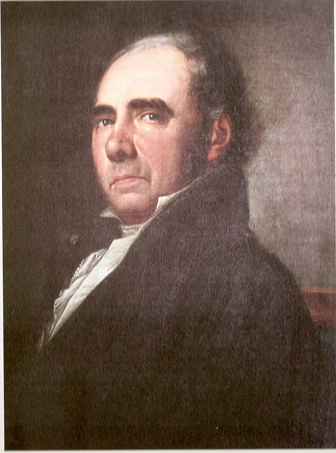 Ölporträt des dänischen Architekten, Inneneinrichters und Lübecker Stadtbaumeisters Joseph Christian Lillie (1760-1827) von dem in Lübeck tätigen Maler und Zeichner Johann Baptist Hauttmann (1756-1832)